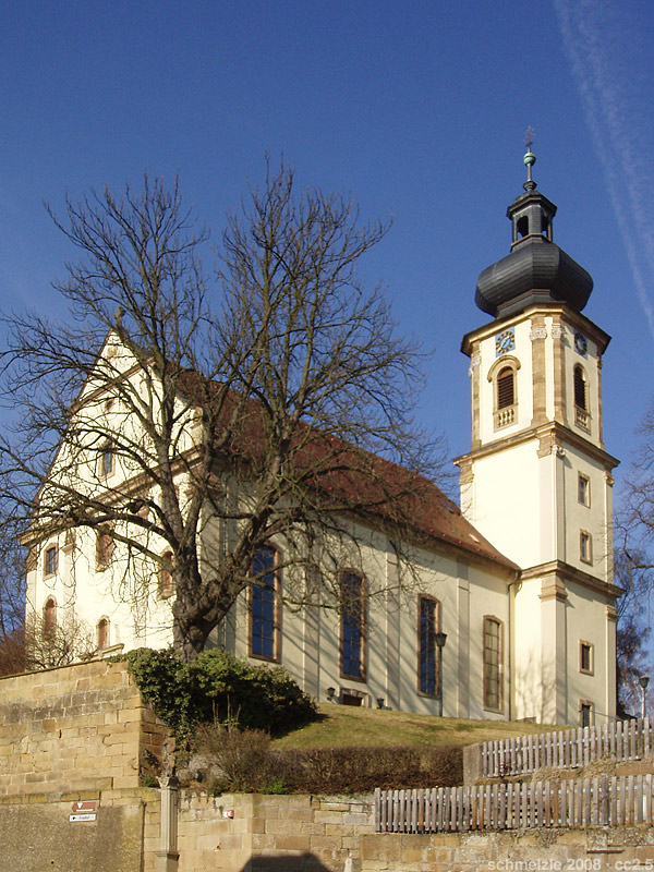 Kath. Kirche St. Michael in Erlenbach-Binswangen